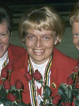 Inger Aufles, Babben Enger Damon og Berit Mørdre Lammedal vant langrennstafetten i Grenoble i 68.